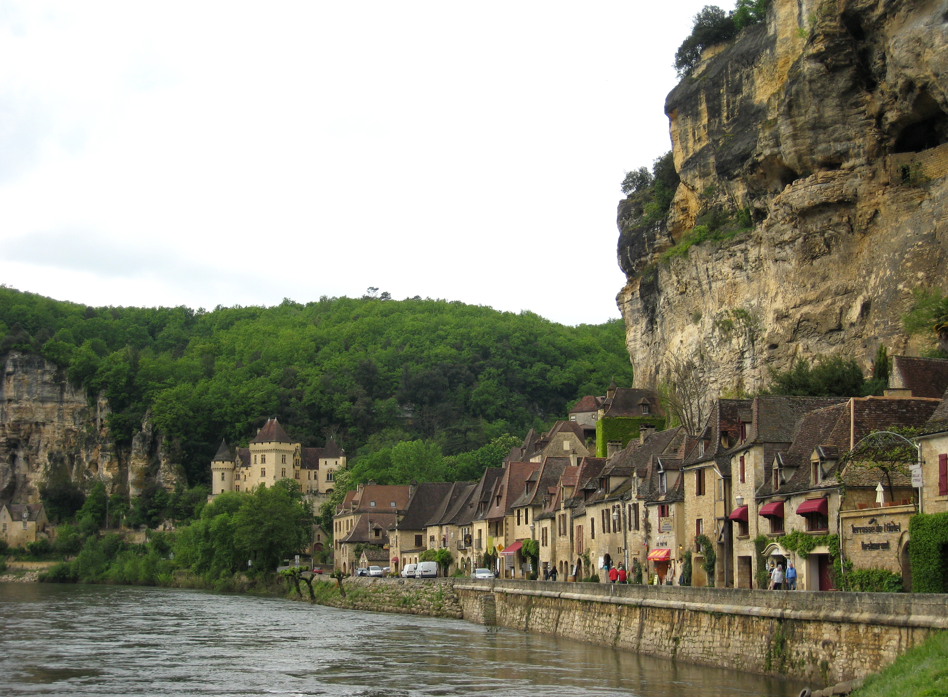 Village of La Roque-Gageac on the river Dordogne, Département Dordogne/France.